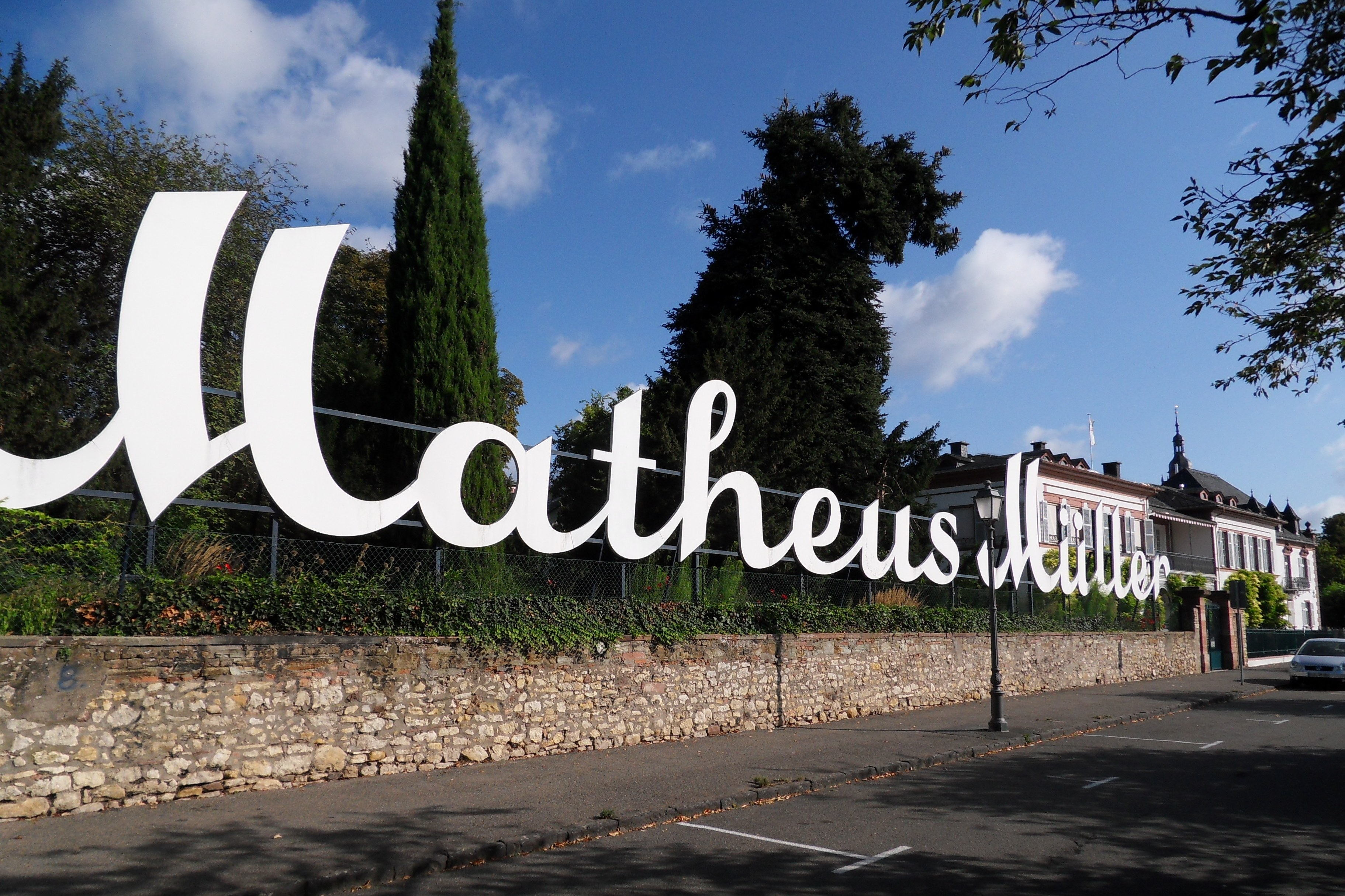 Schriftzug Matheus Müller in leuchtend weißen Riesenlettern am Rheinufer auf dem Gelände der Sektkellerei MM in Eltville. Die Schrift ist von vorbeifahrenden Schiffen aus gut zu lesen. Im Hintergrund die Villa G. H. von Mumm.